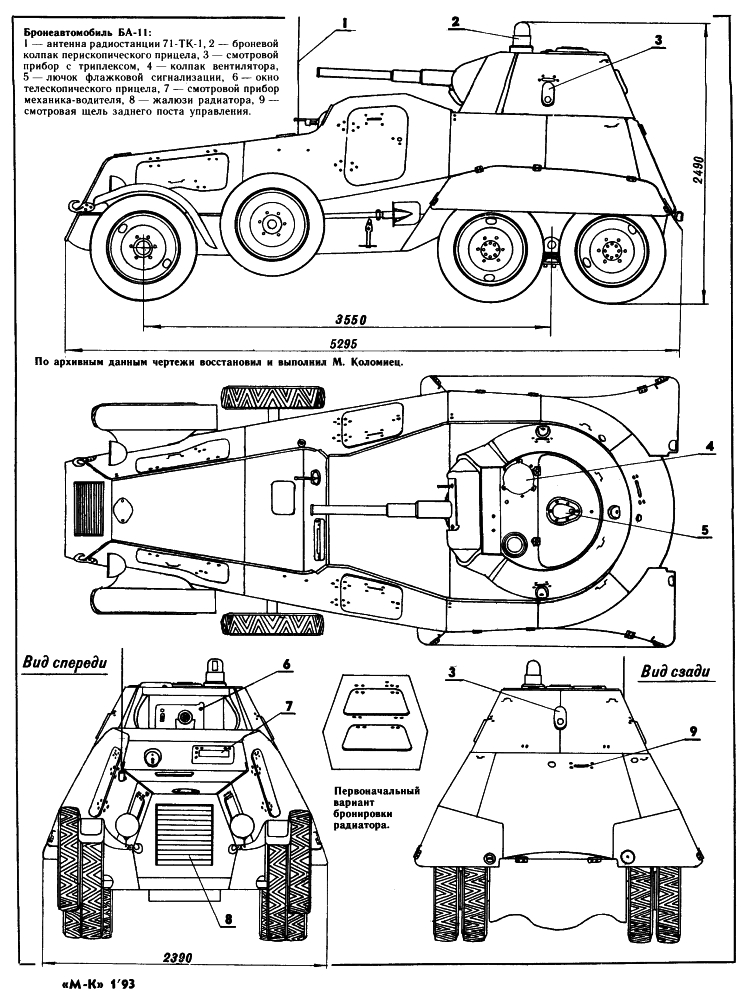 БА-11 Чертеж